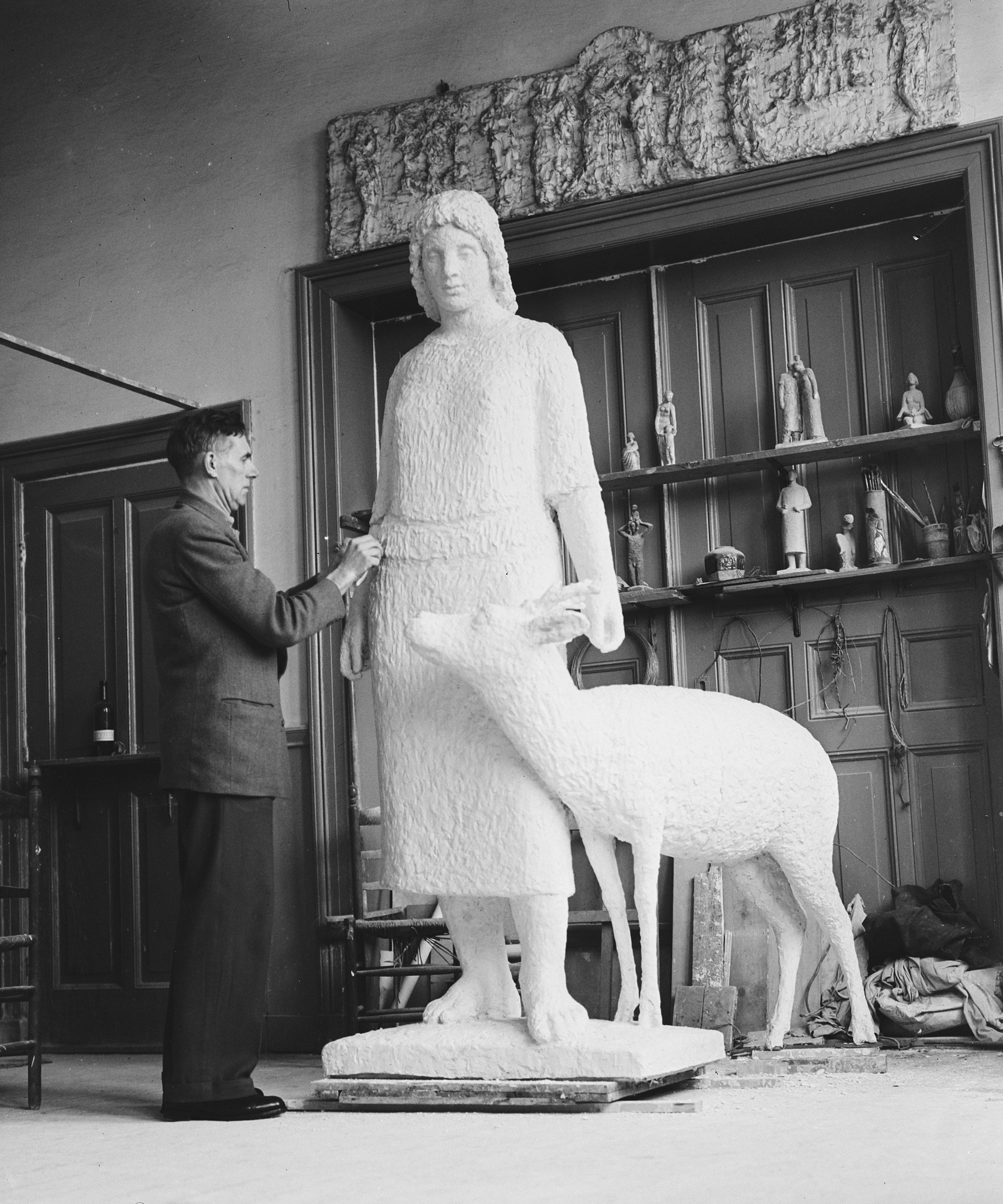 Collectie / Archief : Fotocollectie Anefo Reportage / Serie : [ onbekend ] Beschrijving : Verzetsbeeld Winterswijk, "Tante Riek" van G. Bolhuis uit Amsterdam Datum : 31 januari 1955 Locatie : Amsterdam, Noord-Holland Trefwoorden : beeldhouwers, oorlogsmonumenten, verzet, vrouwen Persoonsnaam : Bolhuis, Gerrit, Kuipers-Rietberg, Helena Theodora Fotograaf : Bilsen, Joop van / Anefo, [onbekend] Auteursrechthebbende : Nationaal Archief Materiaalsoort : Glasnegatief Nummer archiefinventaris : bekijk toegang 2.24.01.09 Bestanddeelnummer : 906-9626